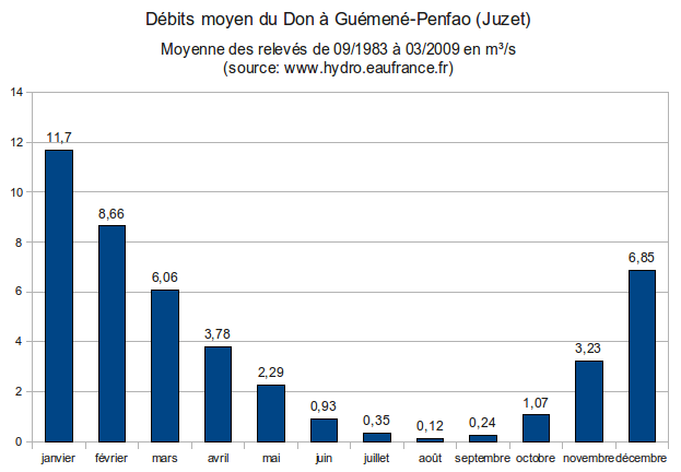 Débit du don relevé à Guémené-Penfao (moyenne relevée de septembre 1983 à mars 2009)